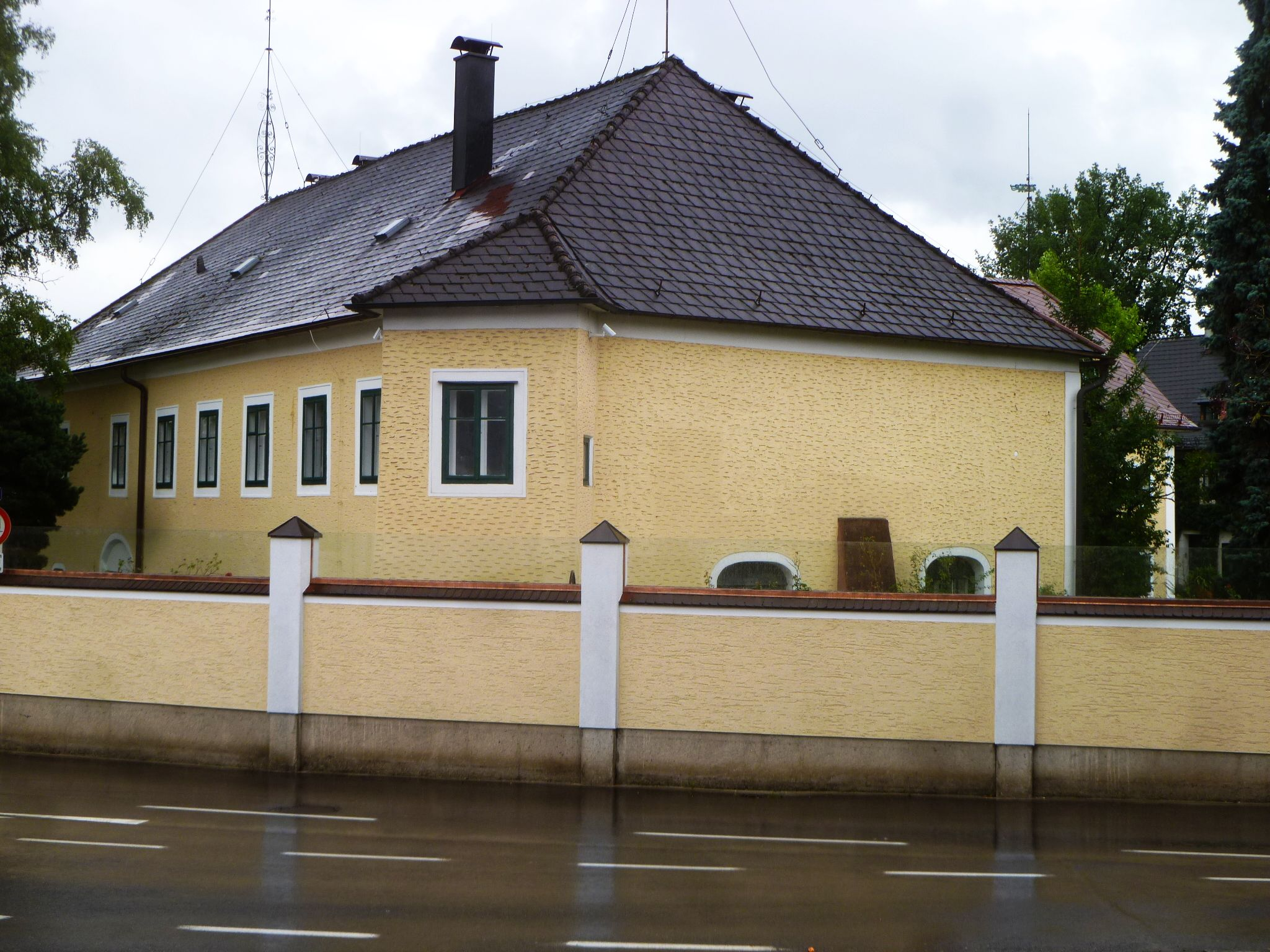 Schloss Schöndorf heute